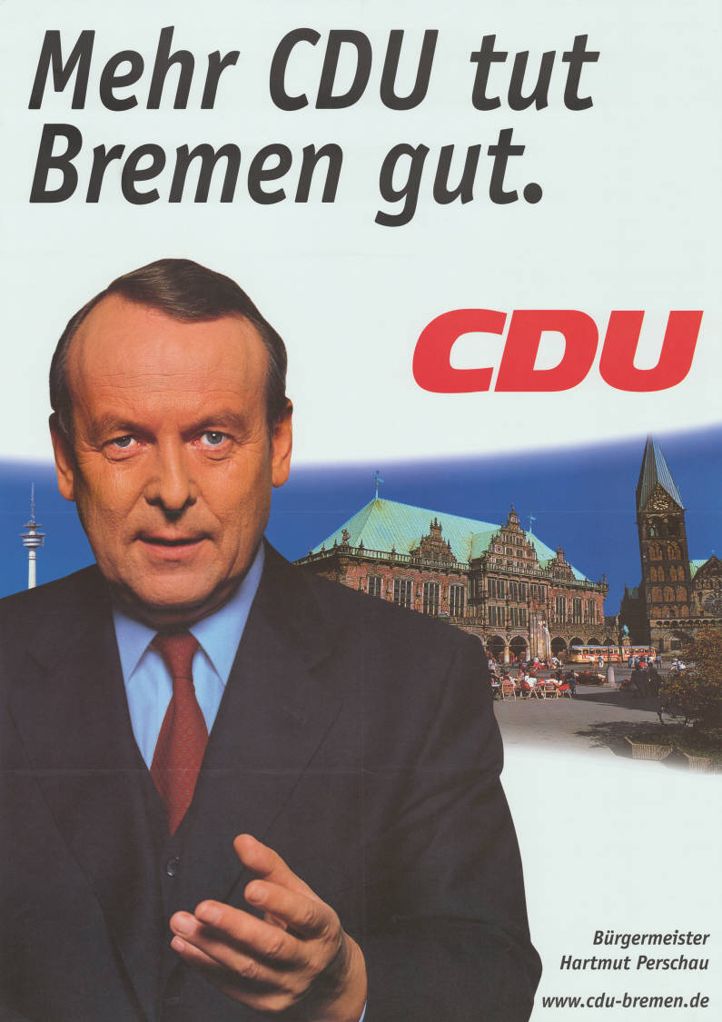 Mehr CDU tut Bremen gut. CDU Bürgermeister Hartmut Perschau Abbildung: Foto vor Bremer Rathaus Plakatart: Kandidaten-/Personenplakat mit Porträt Objekt-Signatur: 10-005 : 1000 Bestand: Plakate zu Bürgerschaftswahlen Bremen (10-005) GliederungBestand10-18: Plakate zu Bürgerschaftswahlen Bremen (10-005) » CDU Lizenz: KAS/ACDP 10-005 : 1000 CC-BY-SA 3.0 DE